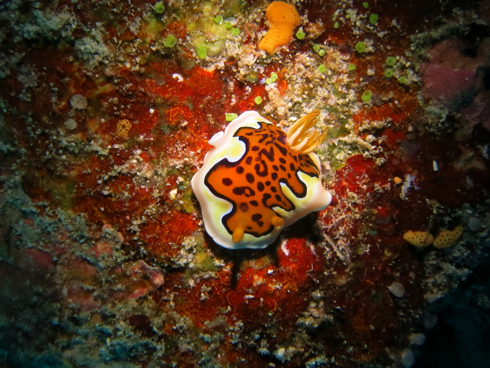 Un nudibranche Goniobranchus gleniei aux Maldives (atoll de Baa).